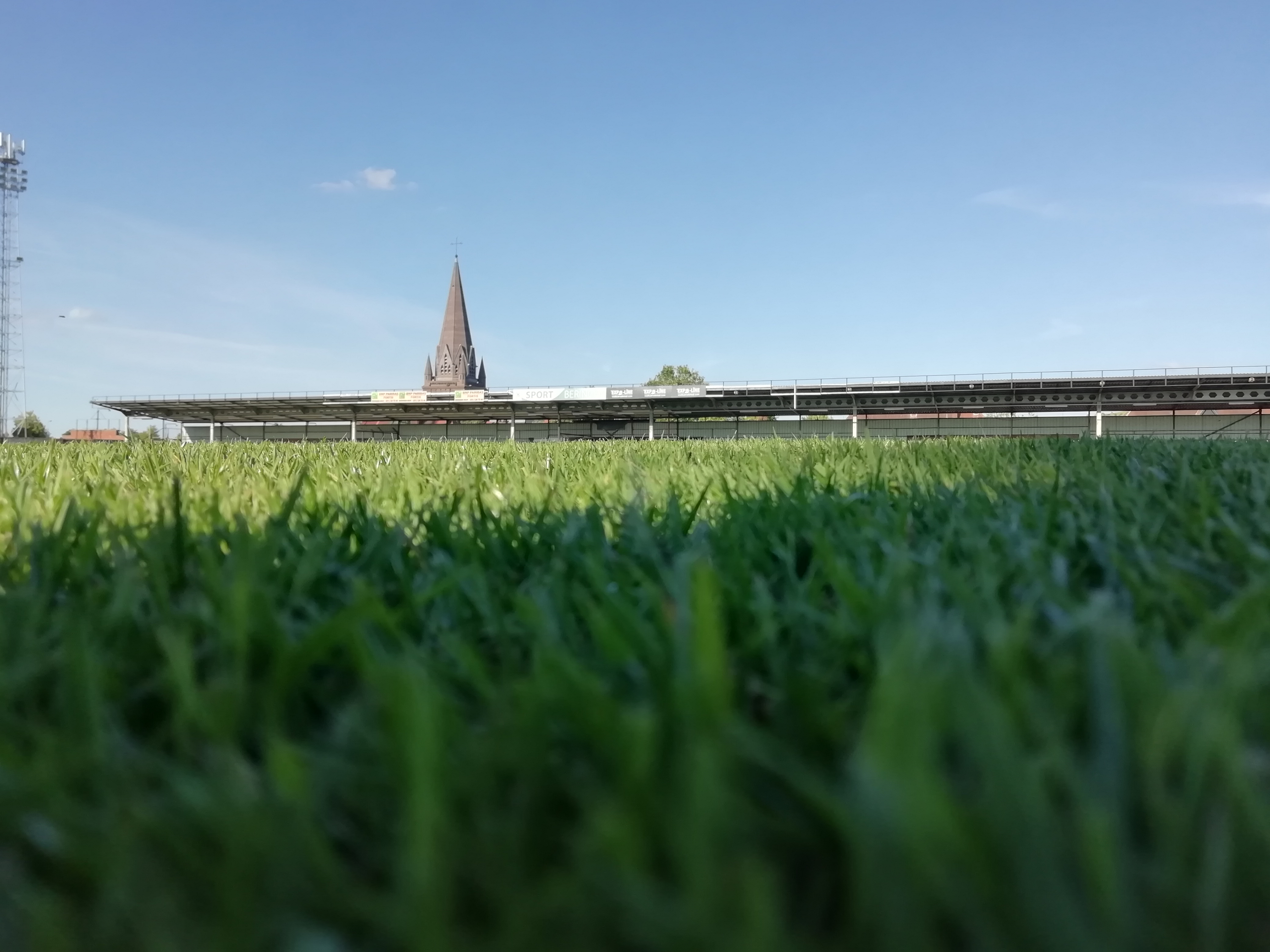 De grasmat van het Mijnstadion met op de achtergrond de Mijnkathedraal.